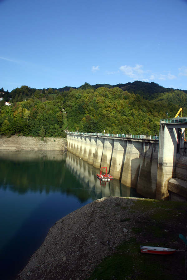 La diga di sbarramento del Lago del Brugneto in provincia di Genova